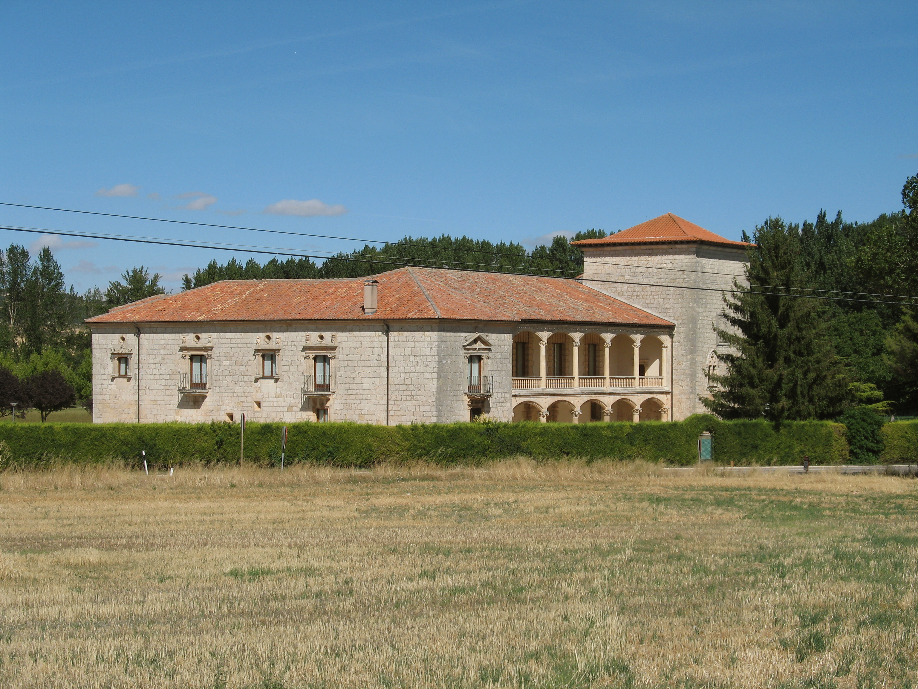 Palacio de Saldañuela